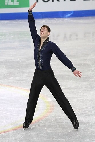 Маттхиас Верслуйс (Финляндия) на чемпионате мира по фигурному катанию среди юниоров 2012